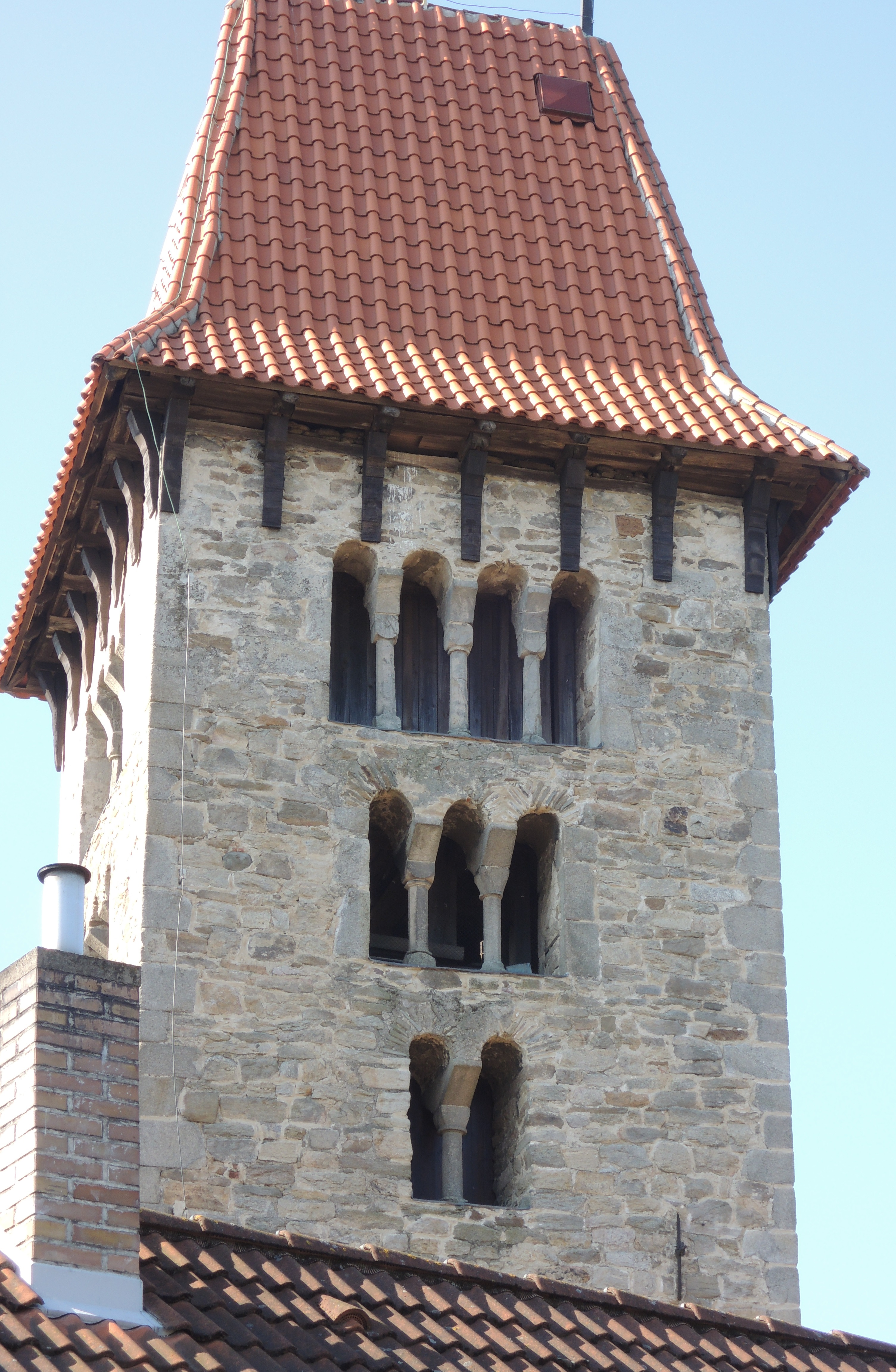 Pohled na sdružená okna severní strany věže kostela sv. Václava, Chřenovice